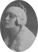 Gaál Franciska magyar színésznő